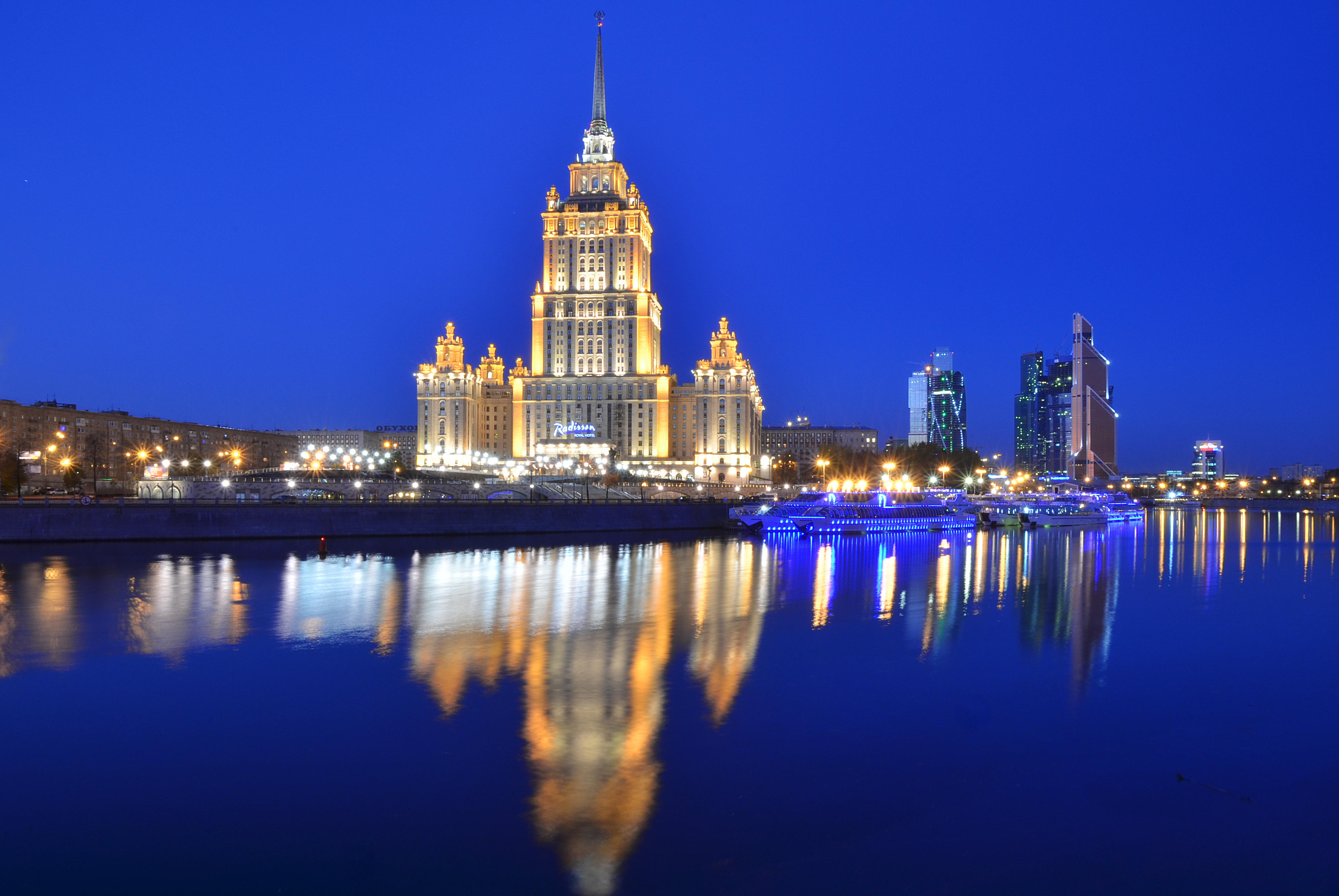 Можно увидеть здесь